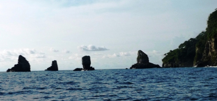 Riscos en el área de la Isla del Coco, llamados "Los Moais" por su parecido a los monolitos de la Isla de Pascua